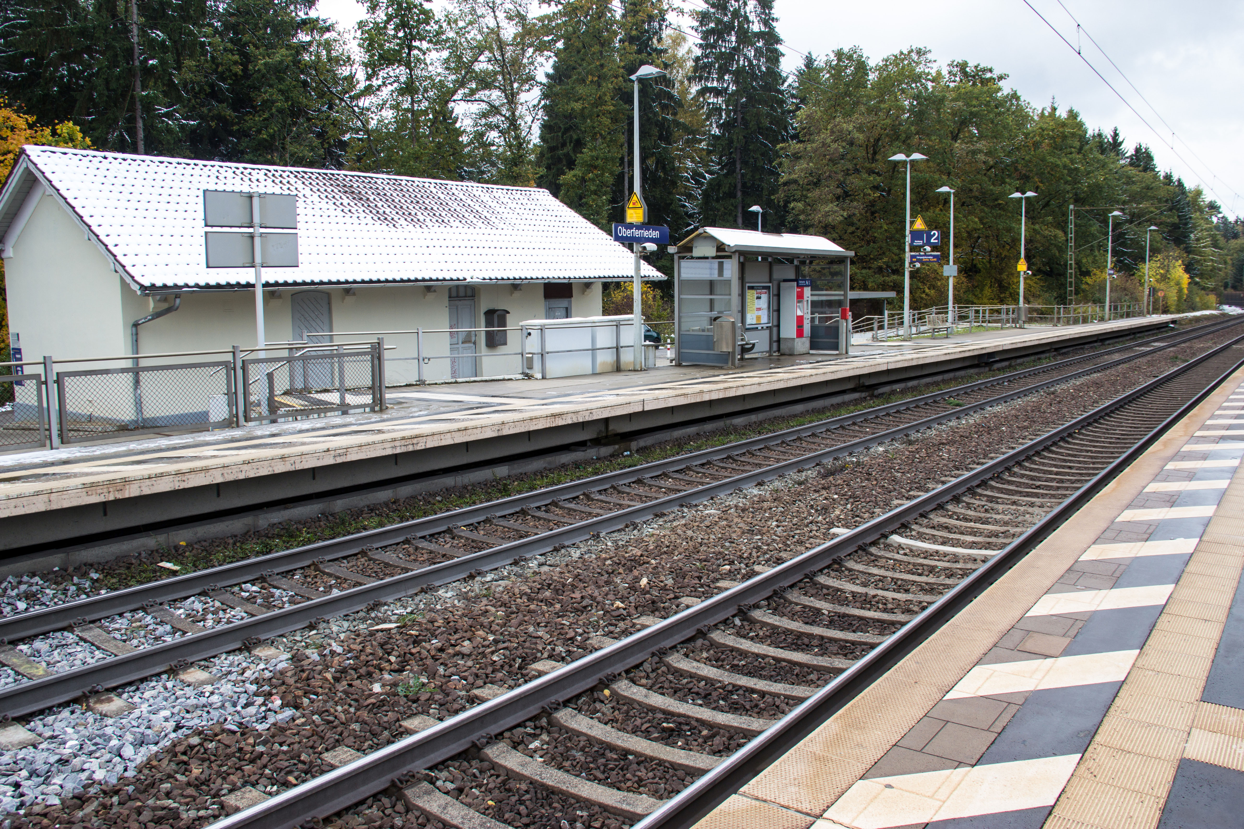 Haltepunkt Oberferrieden